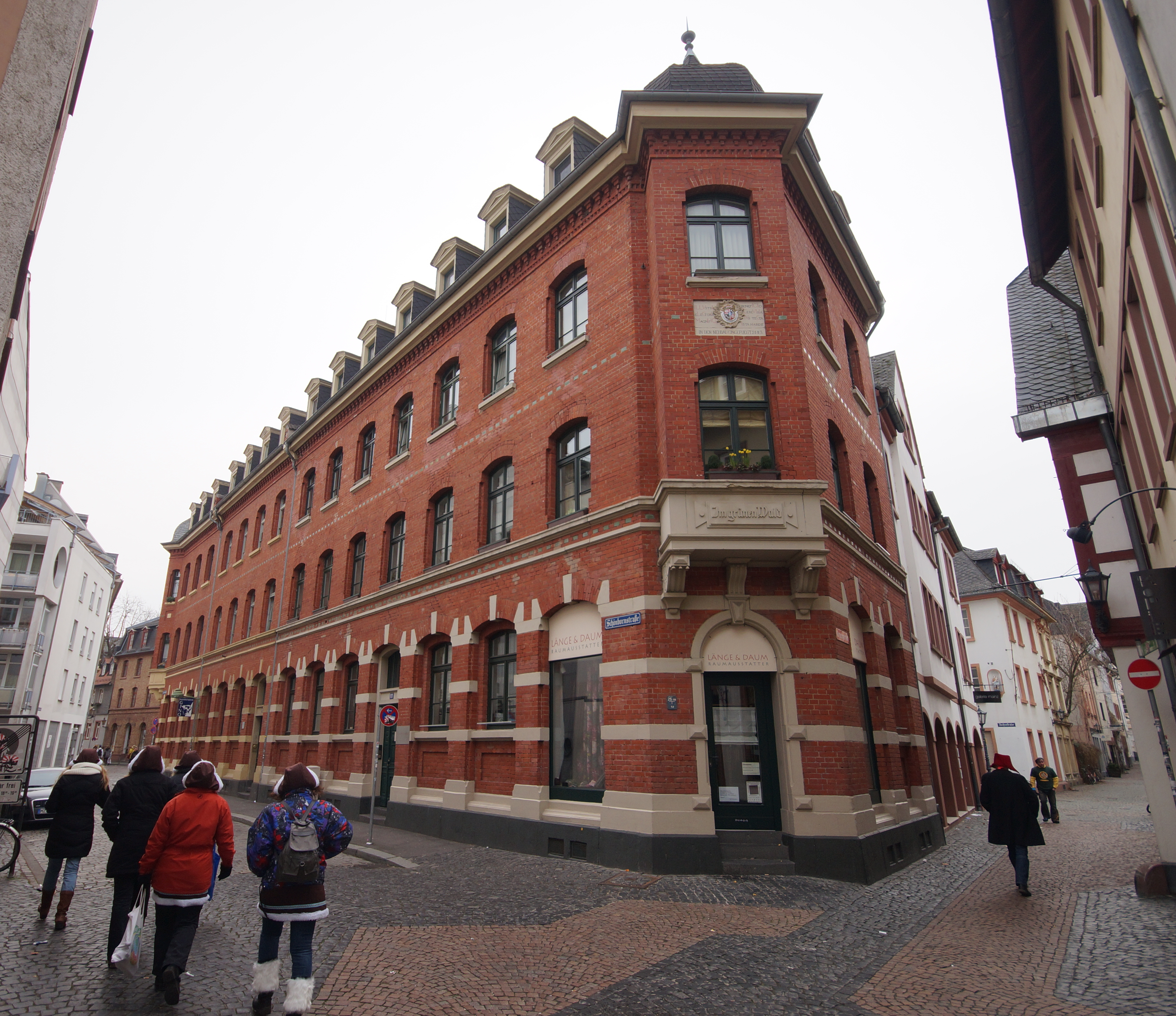 Die Fassade der Hausnummer 13 in der Schönbornstraße in Mainz-Altstadt in der Denkmalzone Schönbornstraße